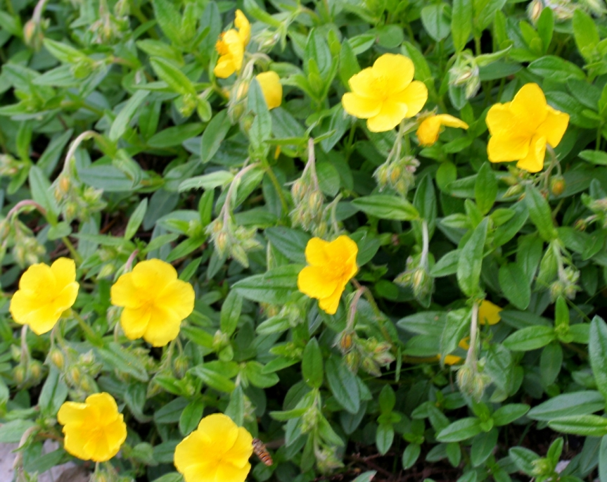 Helianthemum_oelandicum (Eliantemo rupino) Località : Giardino Botanico Alpino "Giangio Lorenzoni", Pian Cansiglio, Tambre d'Alpago (BL), 1000 m s.l.m.